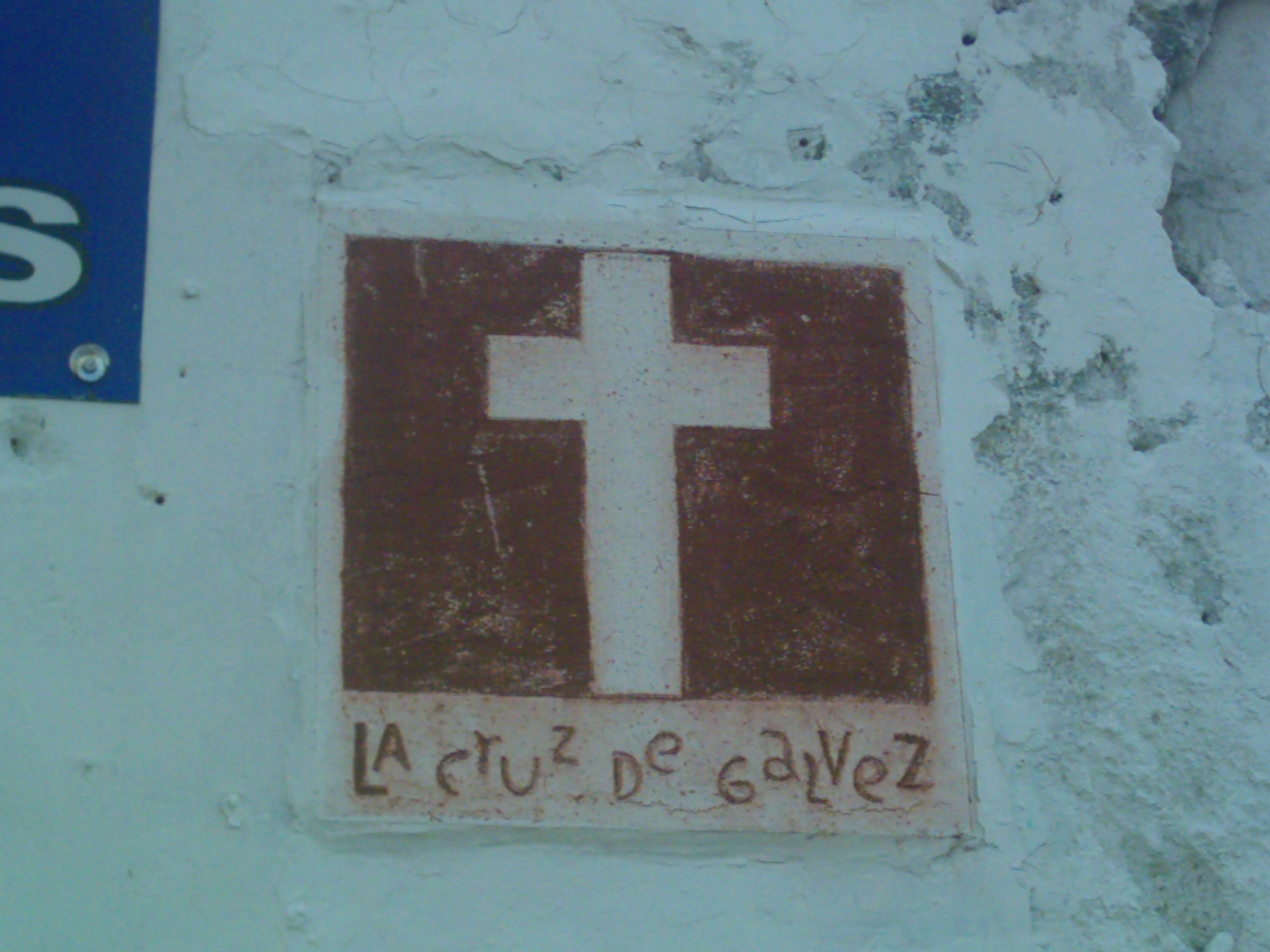 Señalamiento de la ubicación del monumento conocido como "La Cruz de Gálvez"